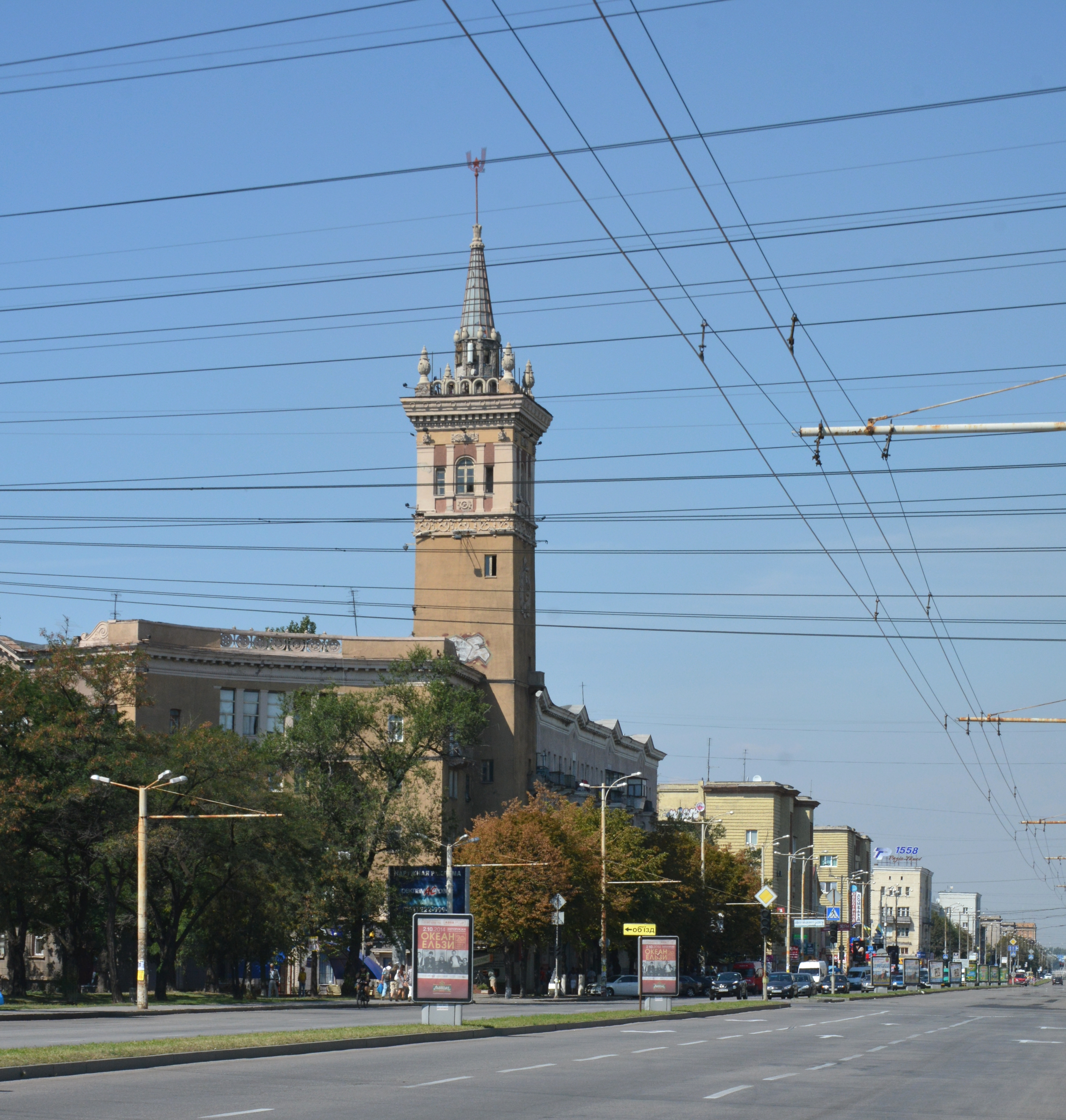 Леніна проспект, Запоріжжя, просп. Леніна